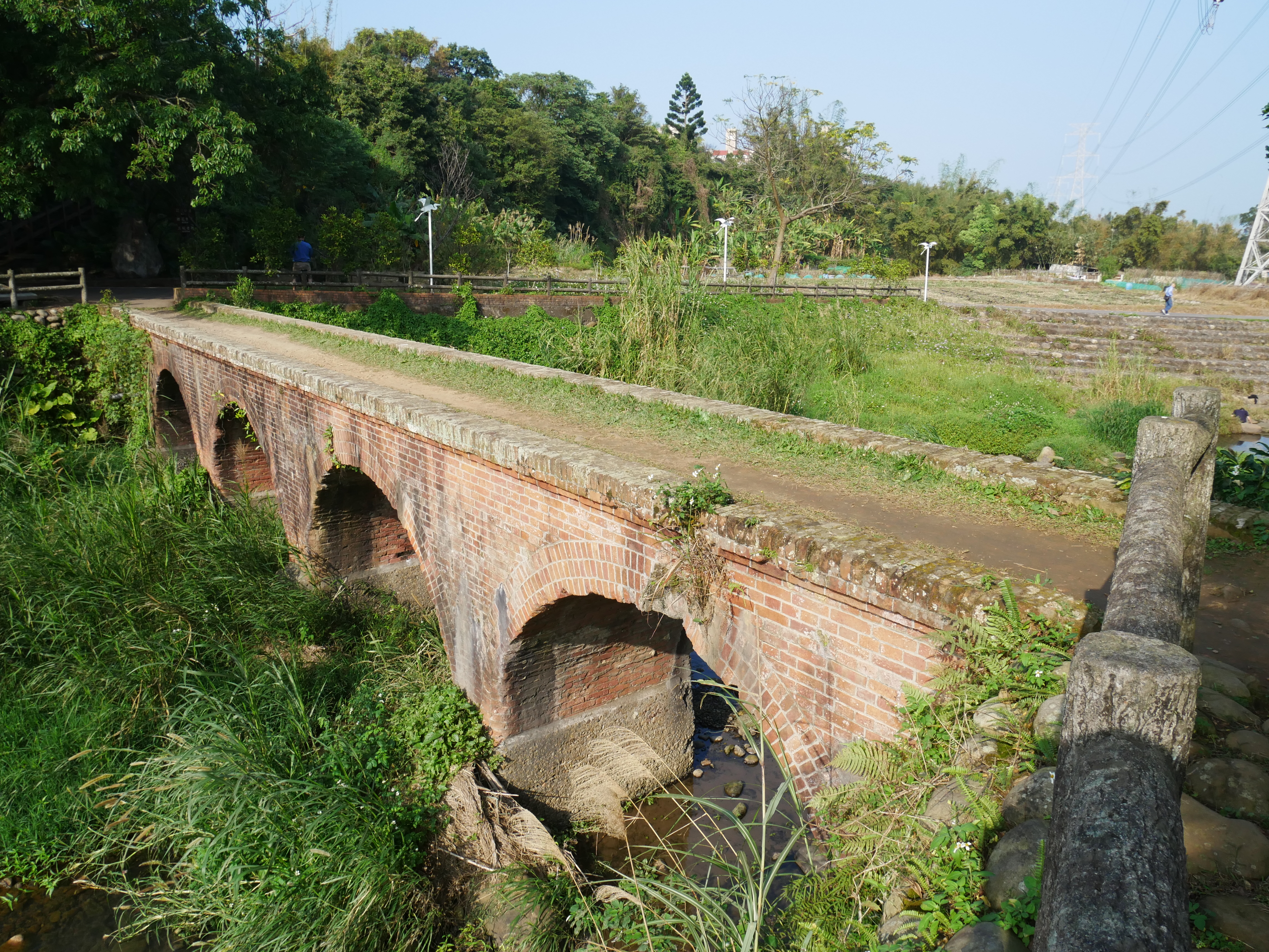 中文（台灣）: 大平紅橋，桃園市龍潭區大平里